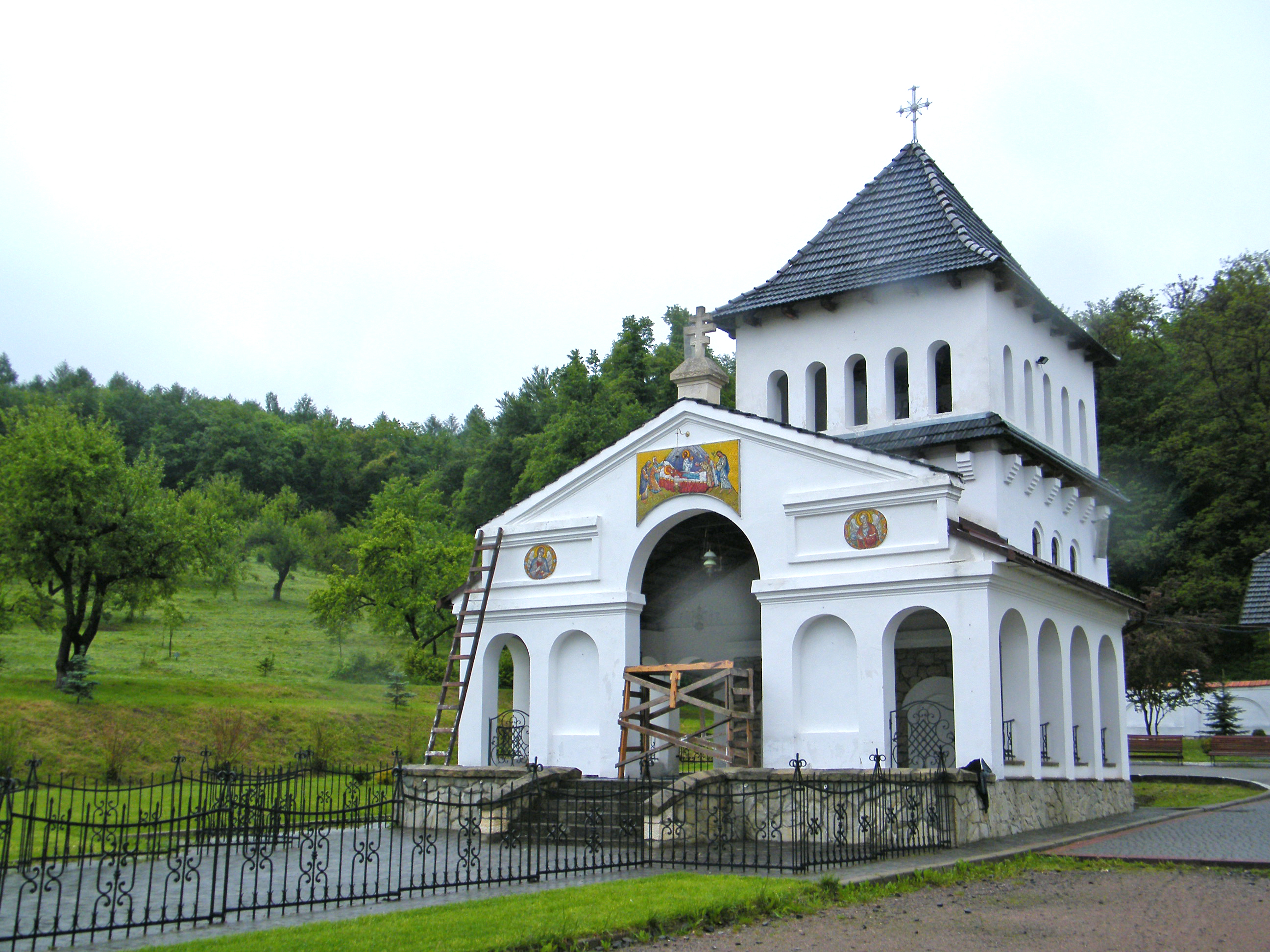 Один из храмов